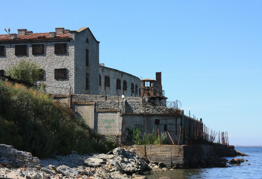 Бывшая Батарейная тюрьма, ныне музей в Таллине